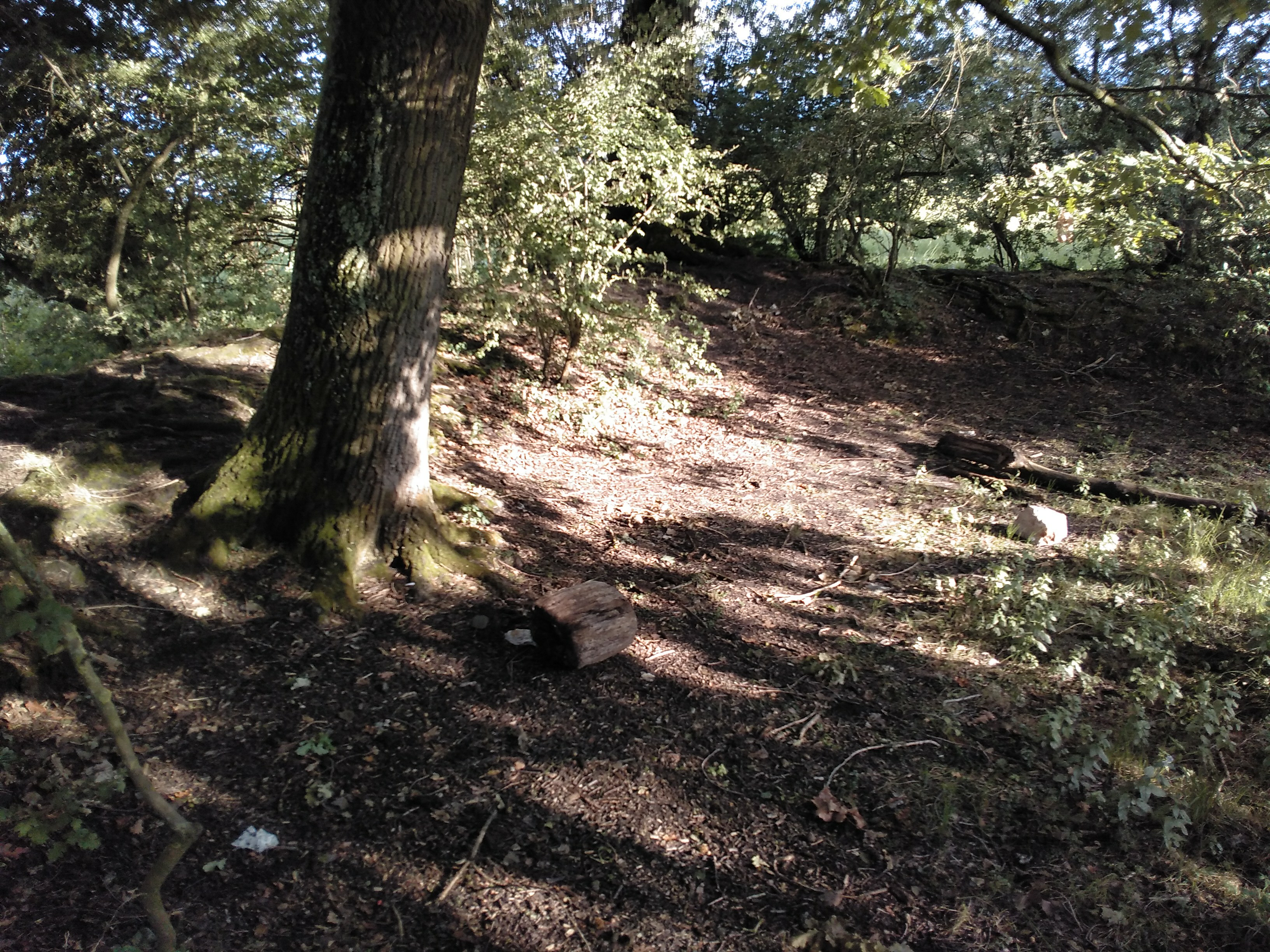 Reste des historischen Ringwalls im Gaißauer Rheinholz